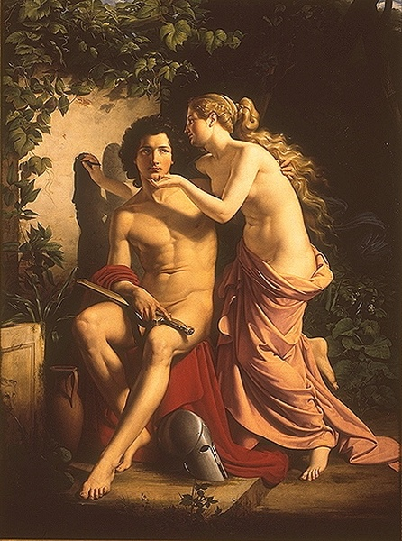 Die Erfindung der Malerei